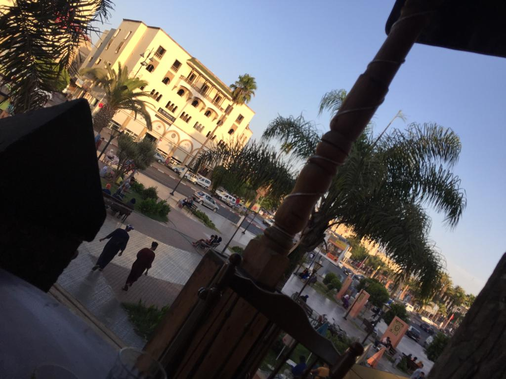 صورة لمدينة سطات الحديثة من سطح على مسافة قصيرة من القصبة الاسماعيلية العريقة